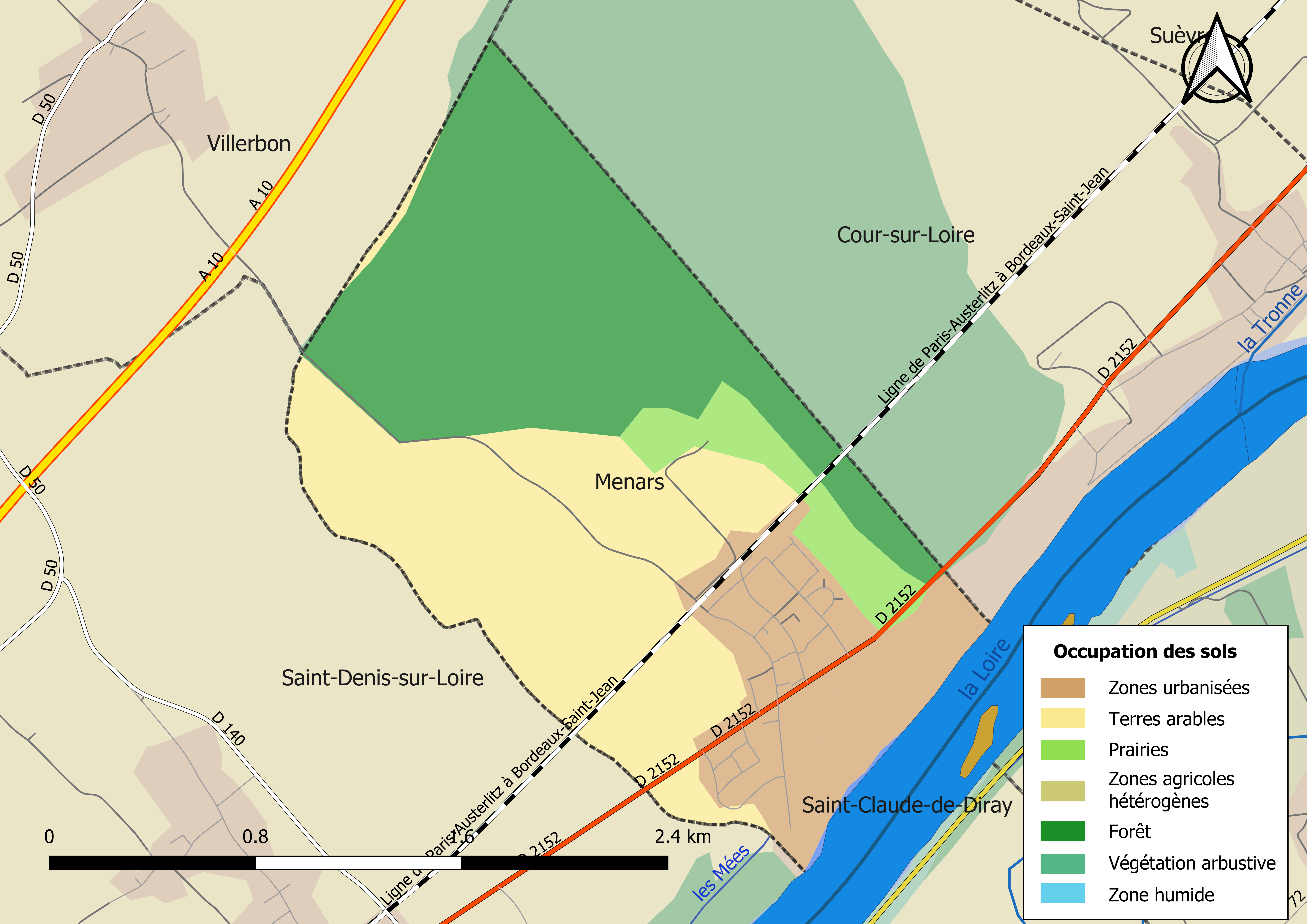 Carte des infrastructures et de l’occupation des sols en 2018 de la commune de Menars (France).